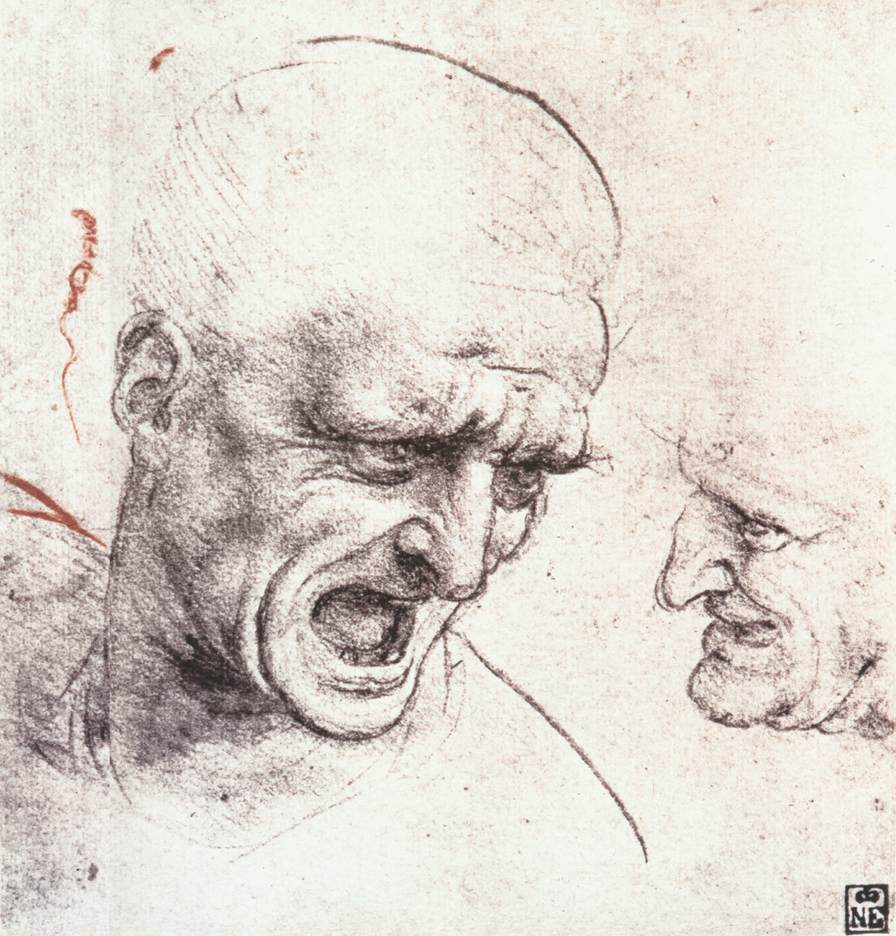 Head studies